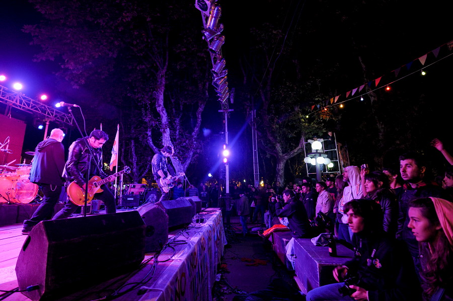 Foto: Santiago Barreiro